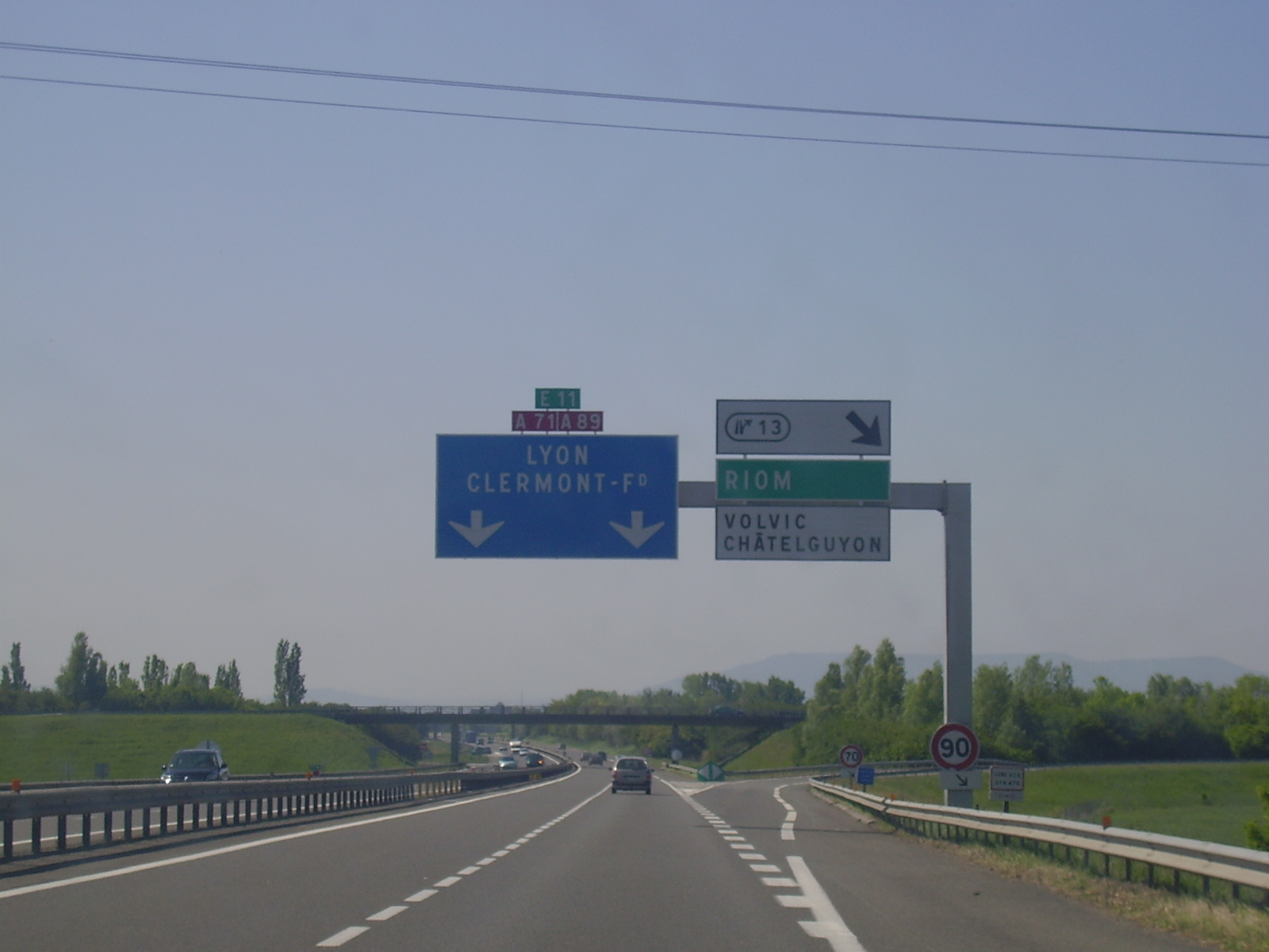 Sortie 13 (Riom - Volvic - Châtel-Guyon). L'A 71 a la double numérotation (A 71-A 89) sur cette section.